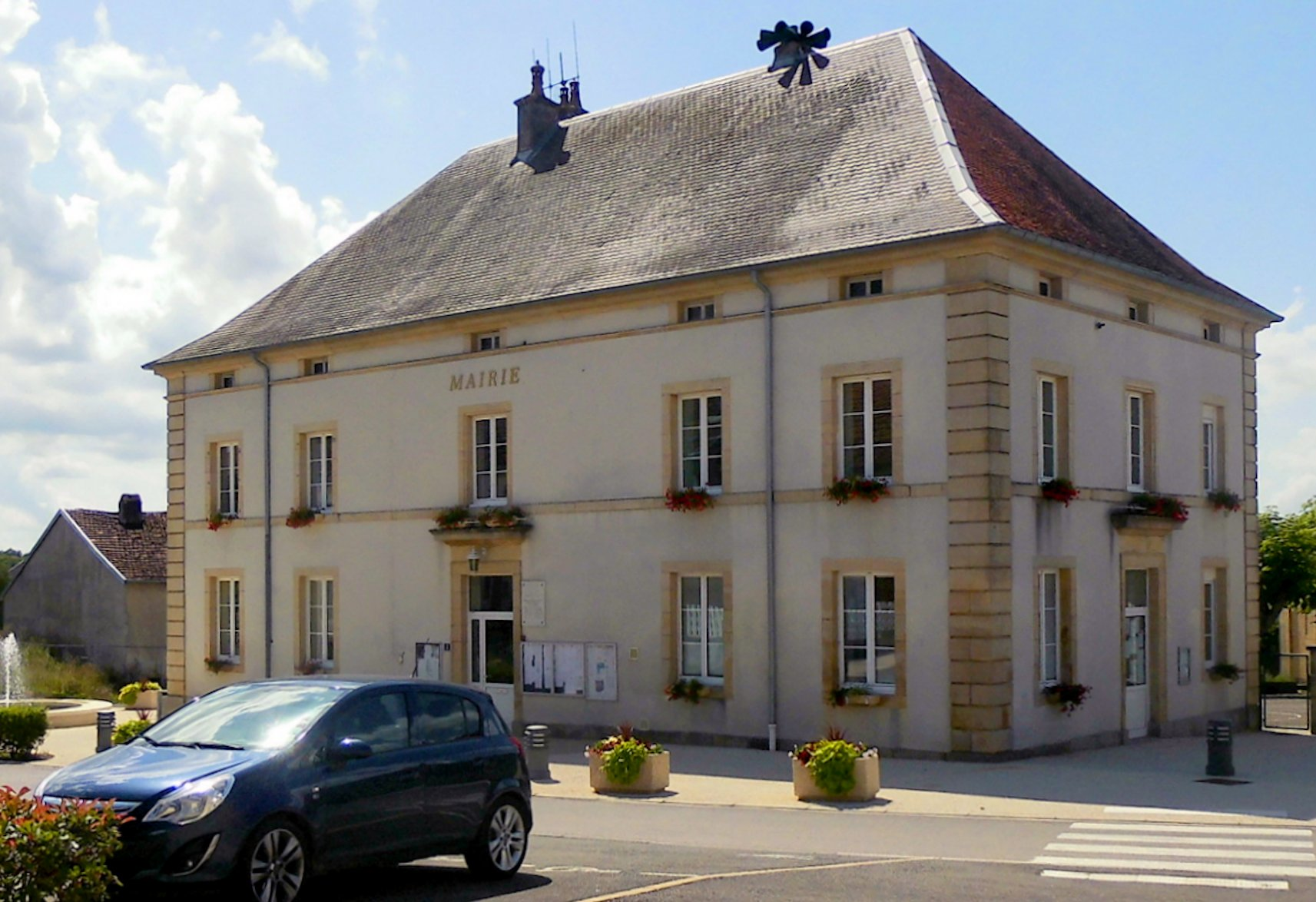 La mairie de Polaincourt-et-Clairefontaine